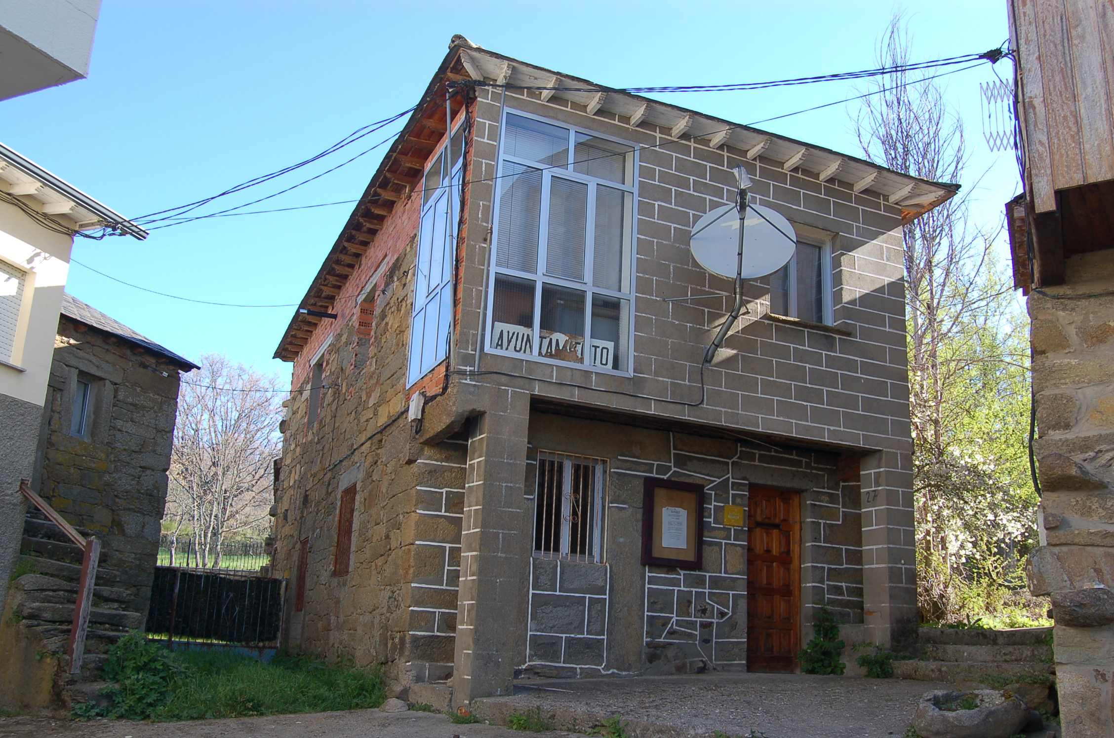 Casa consistorial vella de San Justo